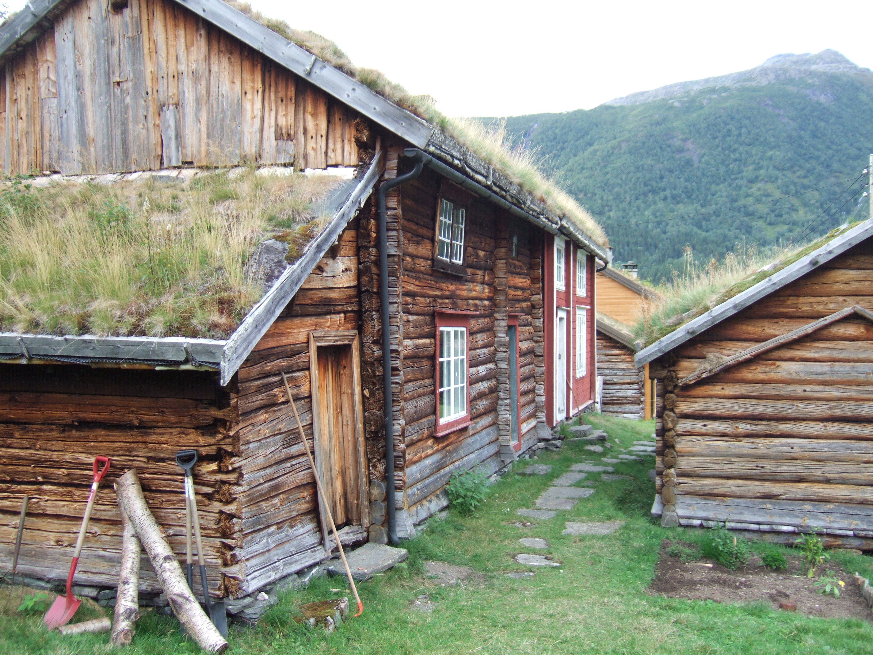 Våningshus tilhørende Sjønstå gård i Fauske kommune i Nordland. Gården er nå fraflyttet.